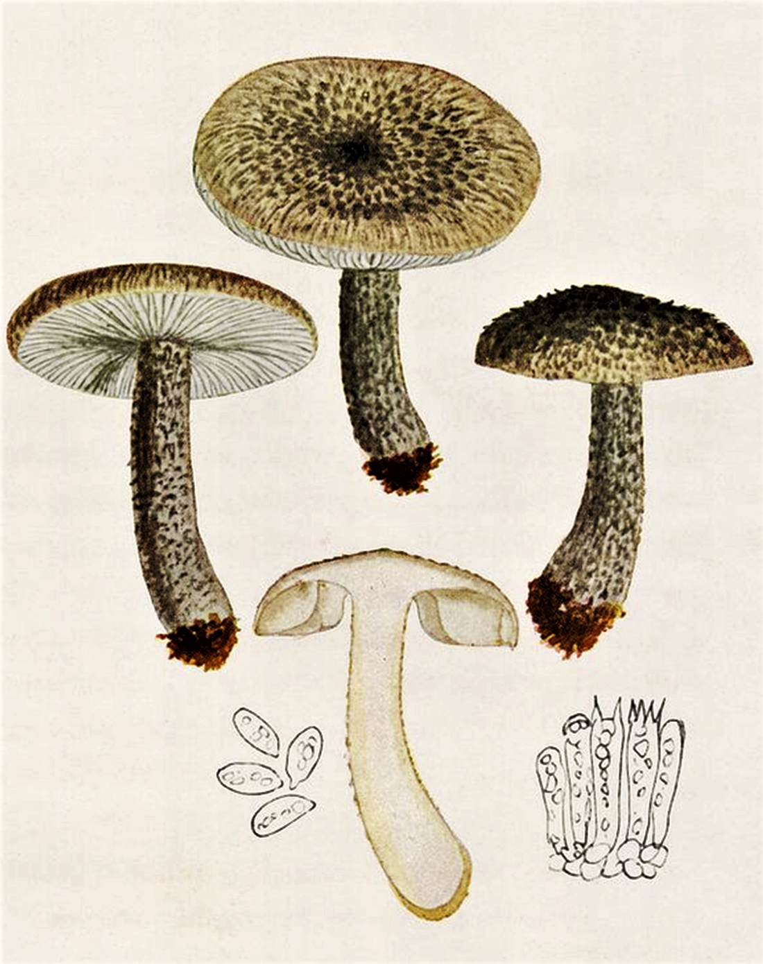 Bres.: Tricholoma squarrulosum Bres. (1892), heute meist Tricholoma atrosquamosum Chevall. (1837) oder Tricholoma atrosquamosum var. squarrulosum (Bres., 1892) Mort.Chr. & Noordel. (1999)